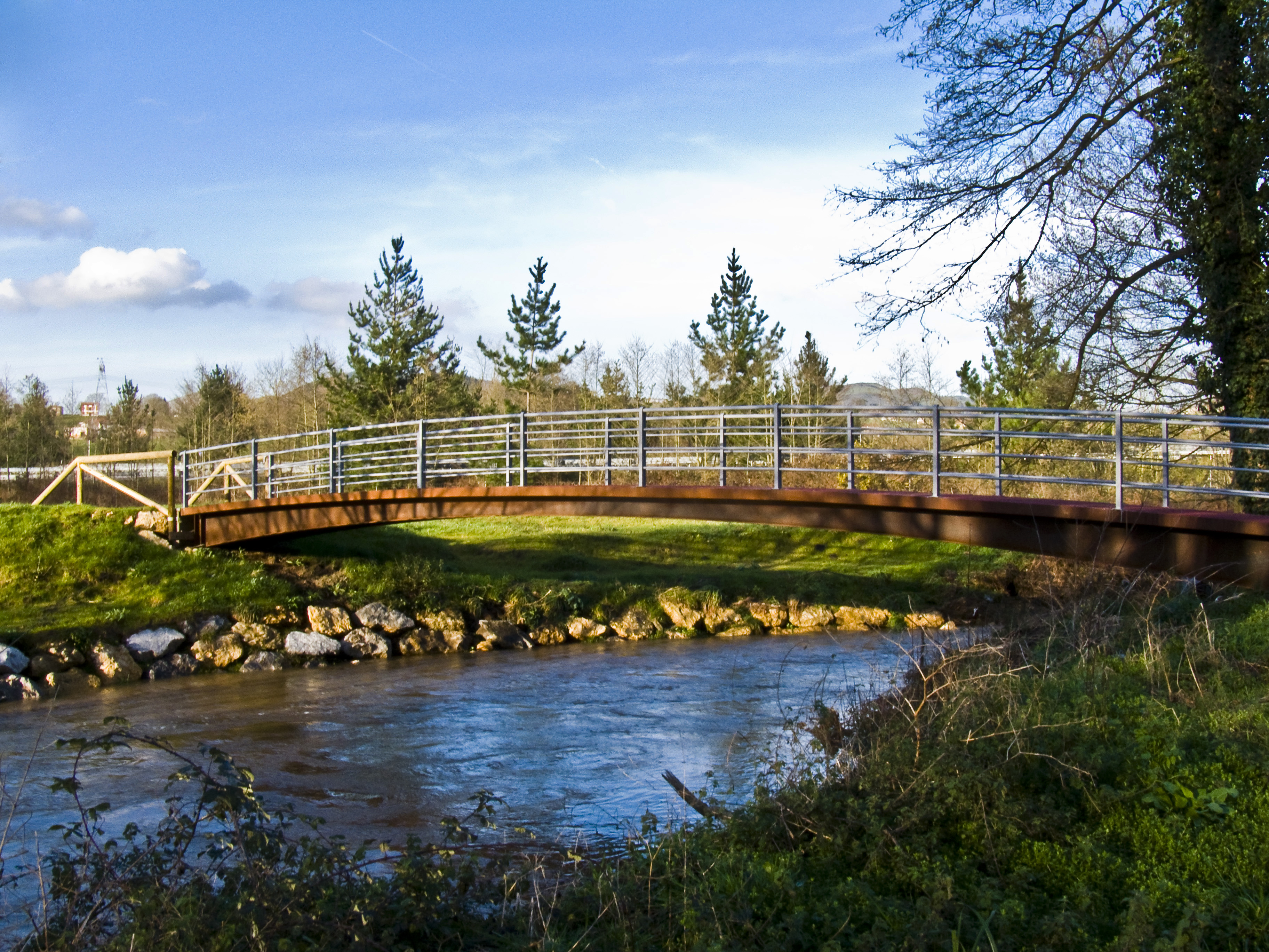 Pontucu de Les Llamargues: En la Senda Peatonal del Río Nora da acceso a la una pequeña península que forma el cauce del río en la zona de Les Llamargues. Se compone de una gran viga metálica con una pasarela y barandillas también de metal. Substituyó a un antiguo y rudimentario puente de madera que los vecinos habían construido con un gran tronco para acceder a la zona de El Trave (Traspando).